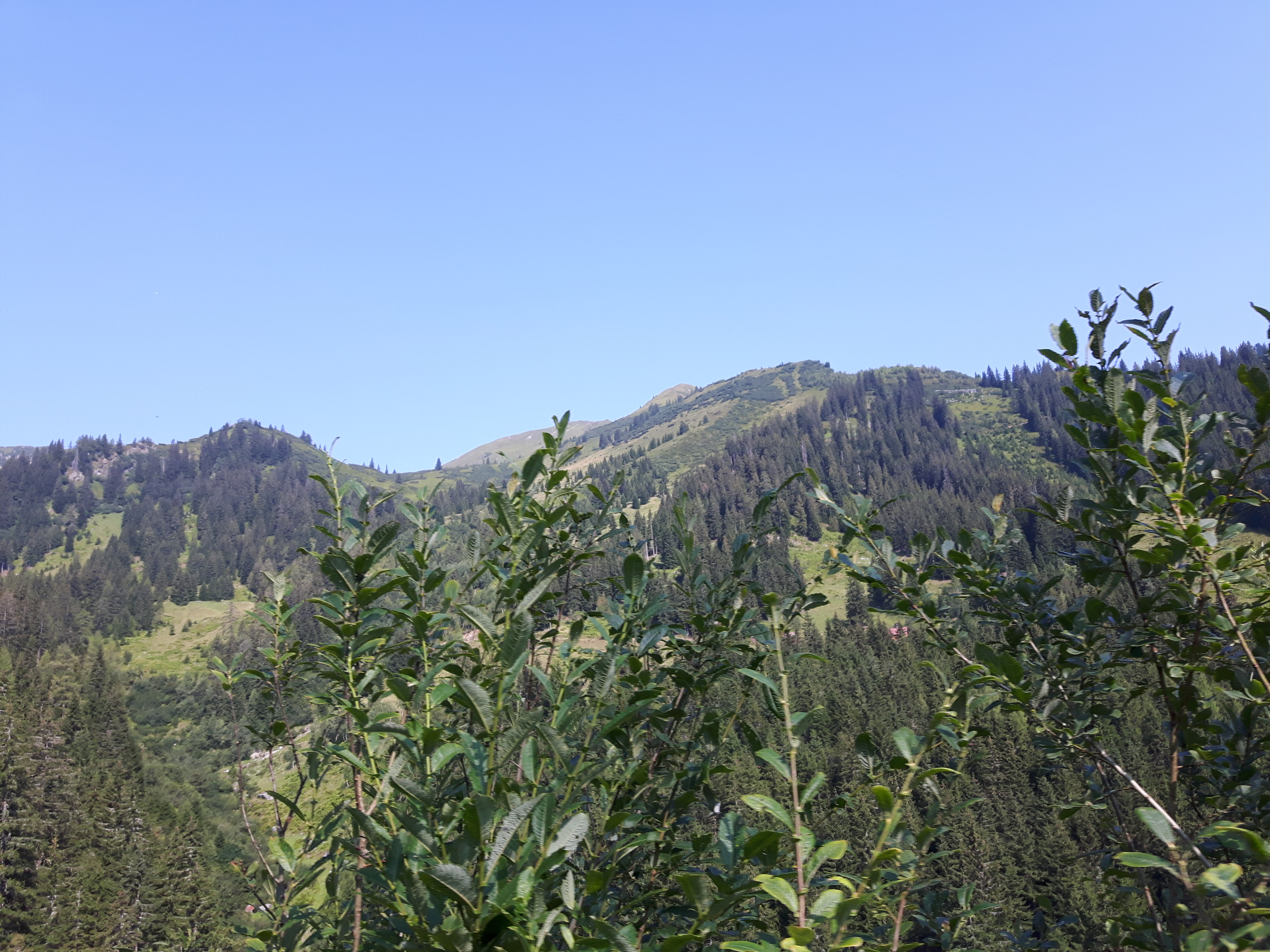 Der Gipfel des Mölbegg (Mitte) in den Wölzer Tauern an der Gemeindegrenze zwischen Aigen im Ennstal und Irdning-Donnersbachtal.